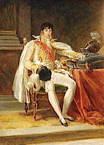 réduction d'un original exécuté en 1806, gravure datée 1852